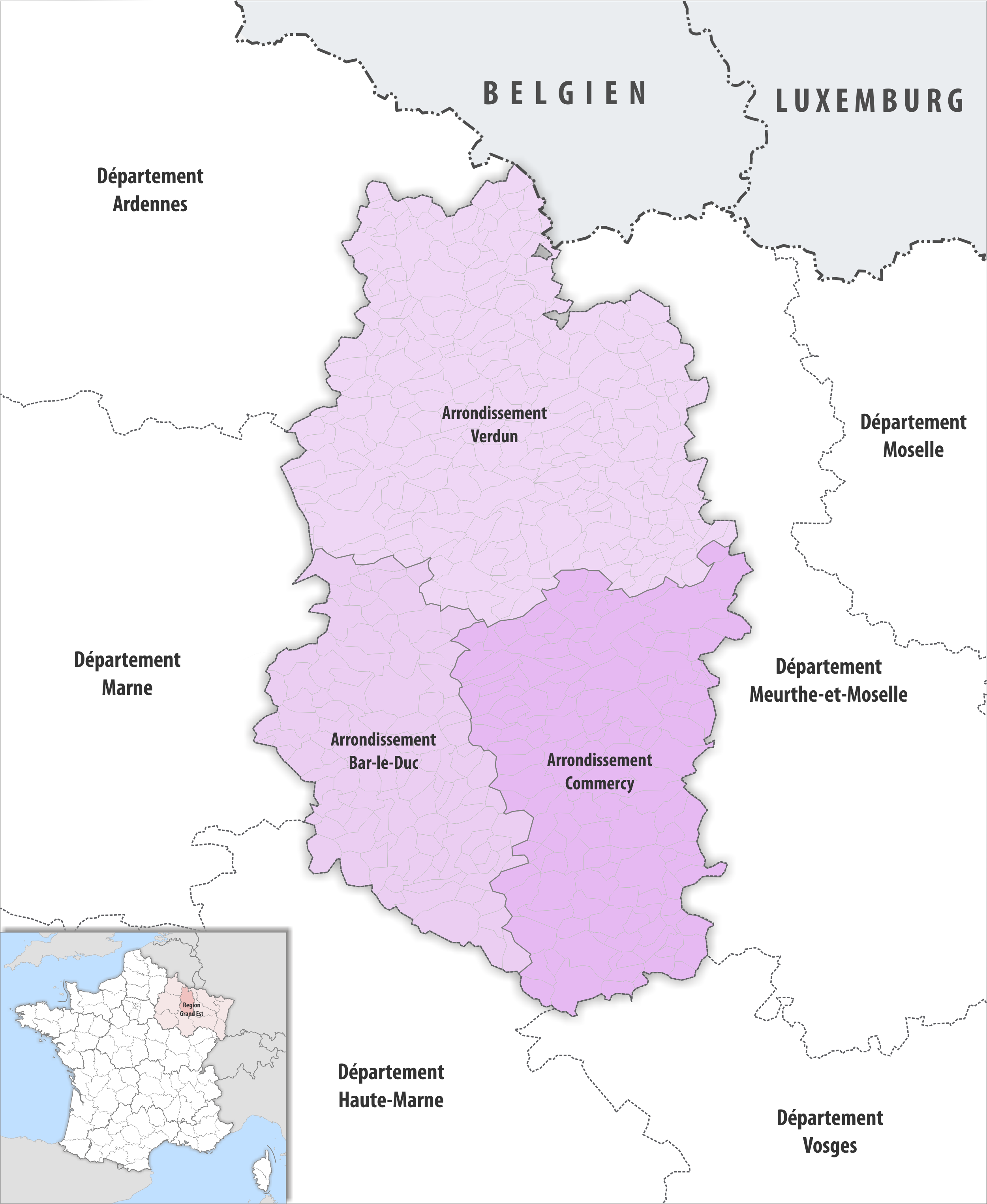 Gemeinden und Arrondissemente im Departement Meuse